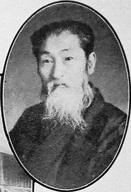 斎藤長三 佐渡肖像録